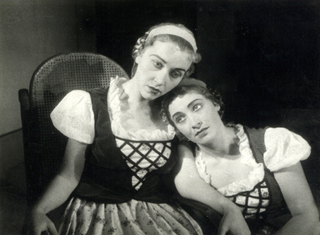 Miroslav Vilhar – Mirko Mahnič, Velika beseda, Večer v čitavnici, Mestno gledališče v Ljubljani. Na fotografiji: Iva Zupančič (Metka), Julka Starič (Ciljka).